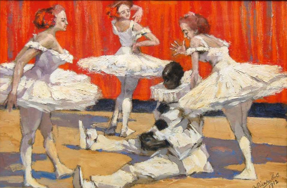 Balletttänzerinnen mit Pierrot. Mischtechnik. Signiert und datiert 1912.